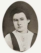 Бардина Софья Илларионовна - русская революционерка, народница.